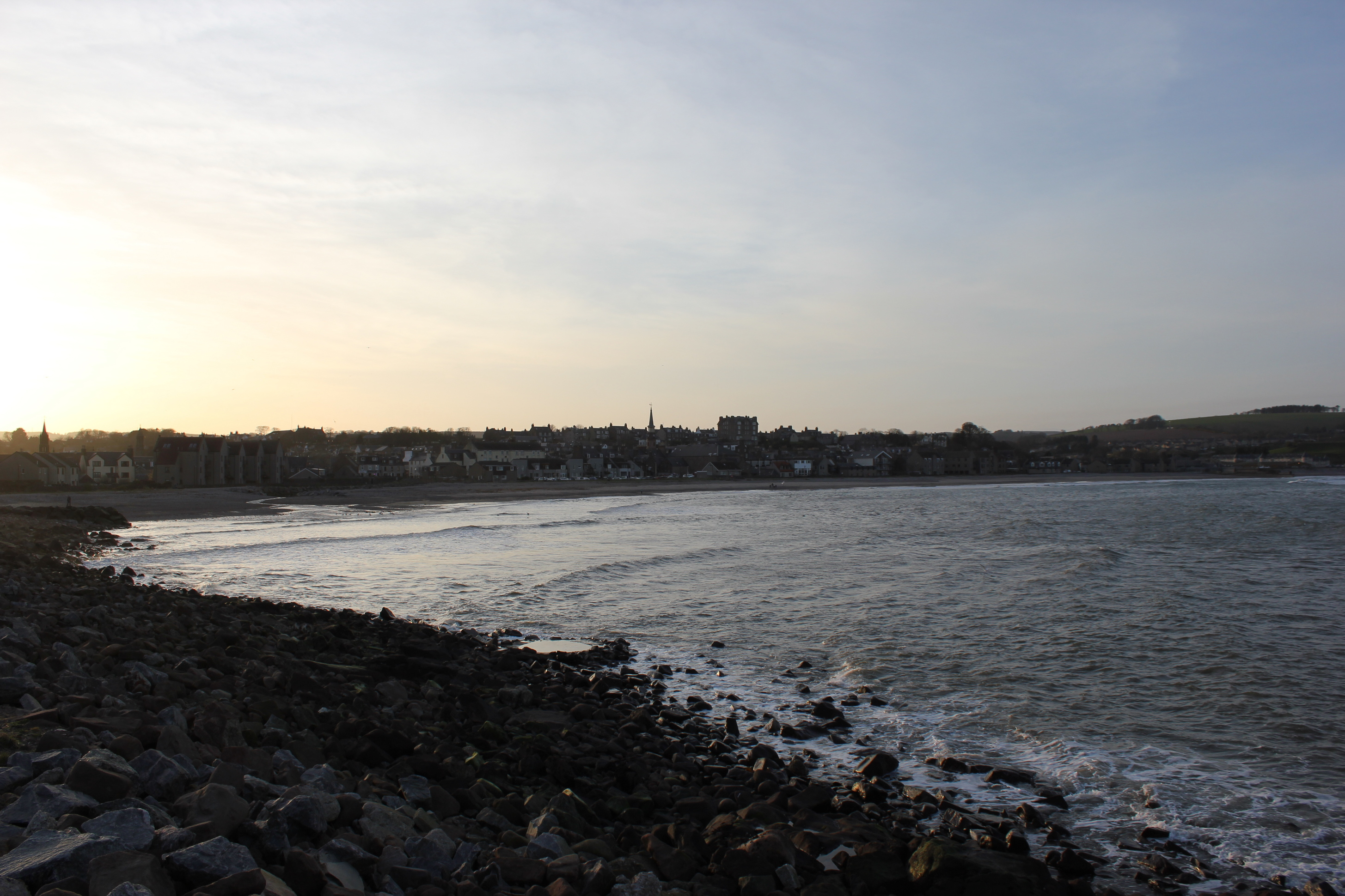 Das Städtchen Stonehaven südlich von Aberdeen, Schottland.